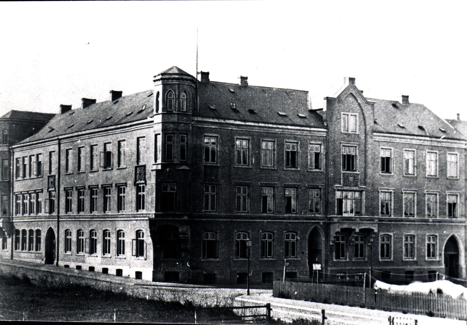 Fotografie des Gebäudes der Marinestation Ostsee/Marineschule Kiel